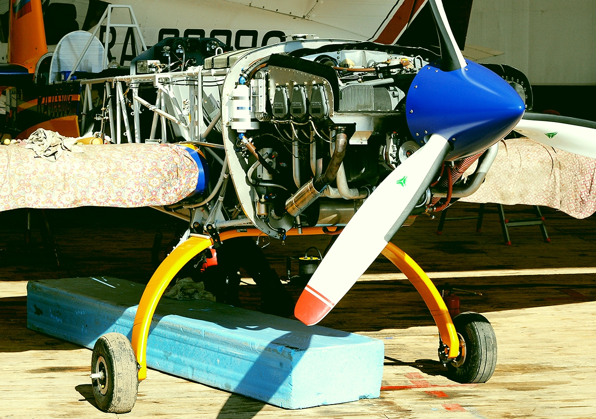 Extra 330LC RA-0330G